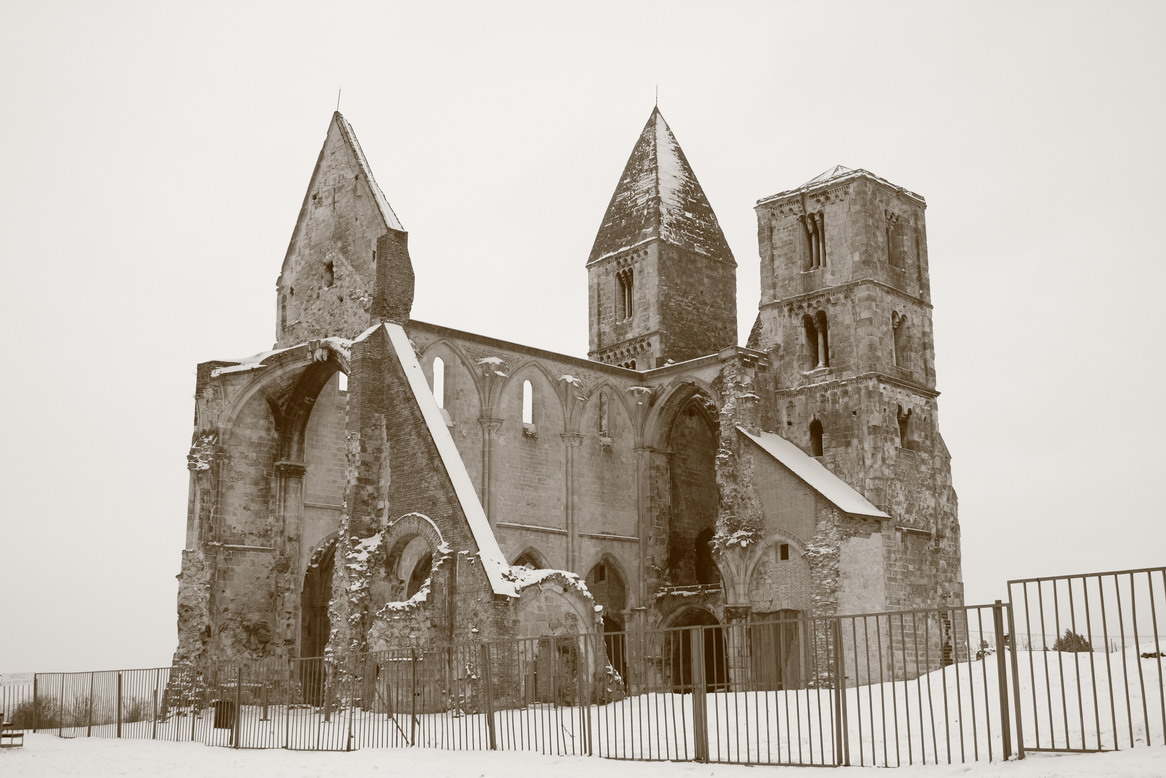 Zsámbék